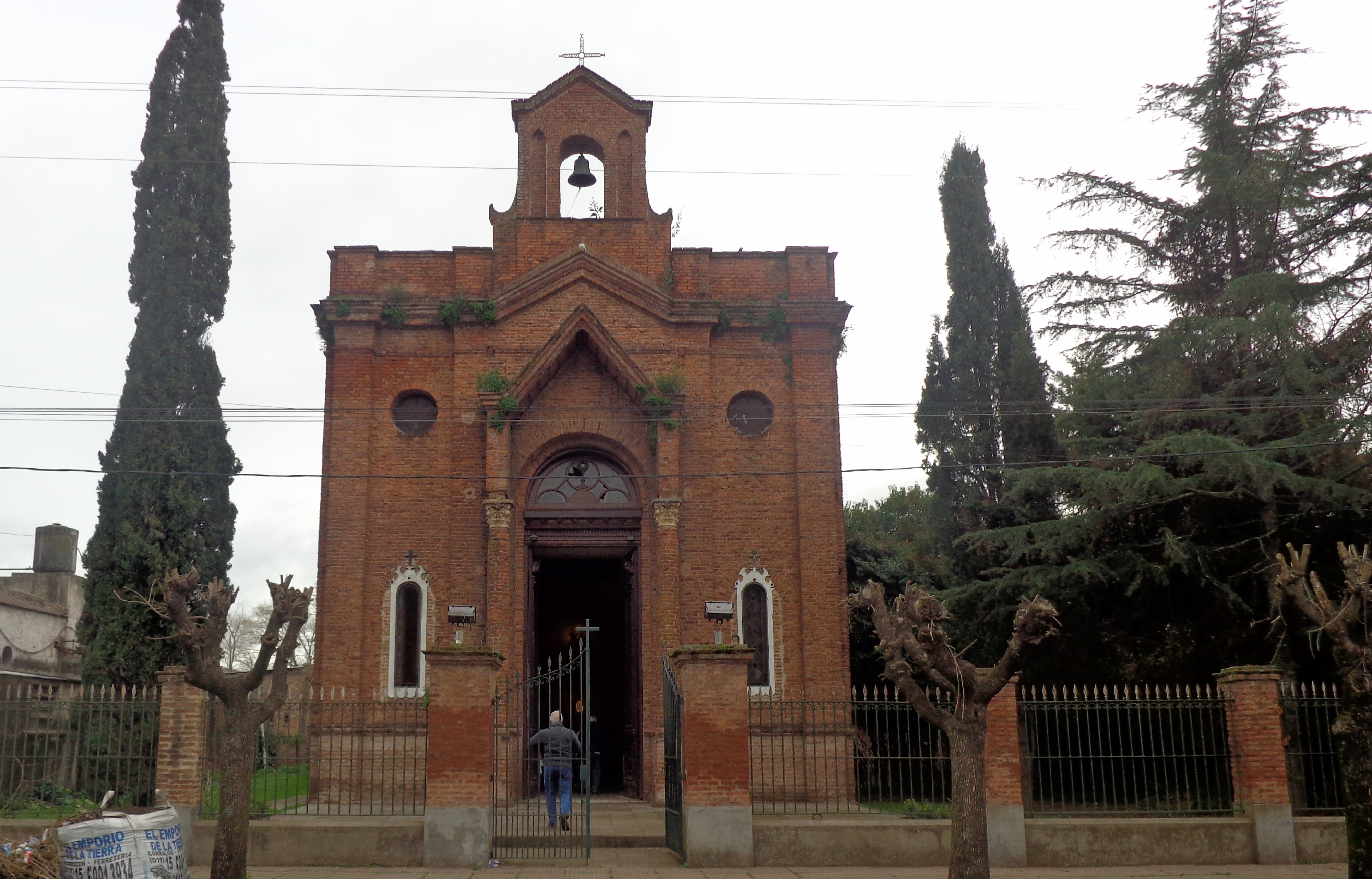 Capilla de San Carlos de Borromeo, en Carlos Keen, Partido de Luján, Provincia de Buenos Aires, Argentina